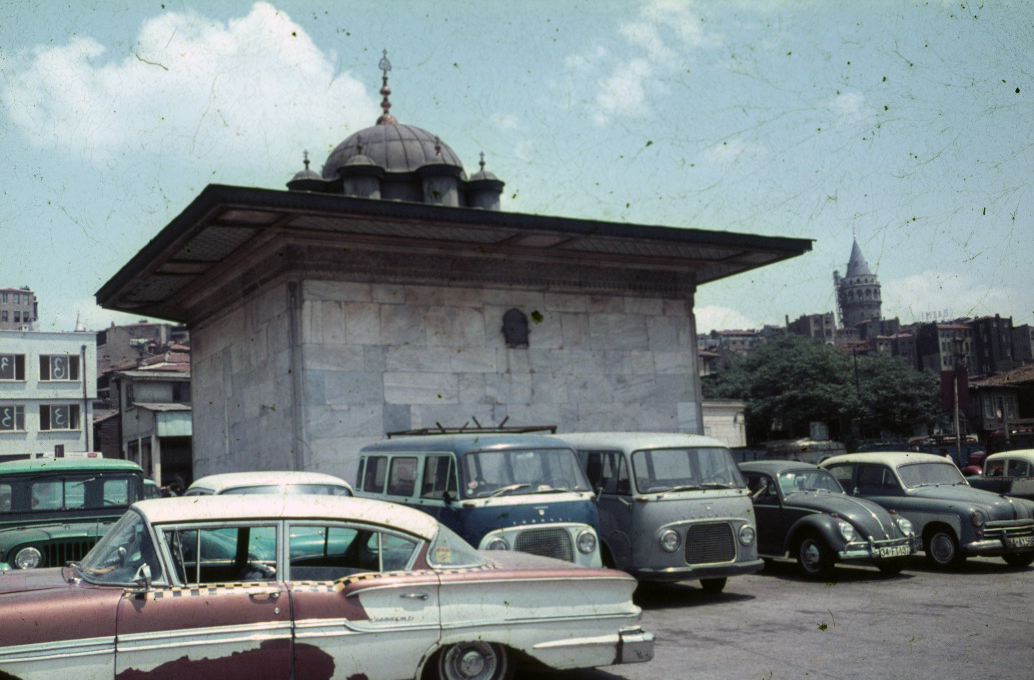 Saliha Sultan Fountain, a typical square fountain of 18th century Ottoman architecture, was built on the order of Valide Saliha Sultan, mother of Sultan Mahmud I, by the architect Mehmet Ağa. In the style of the Tulip Period of architecture, the foundation is adorned with marble floral motifs. This decorative layer was partially demounted in 1910 by Kemal Altan to be renovated, but it couldn’t be replaced for some years because of the First World War. The second restoration was perfomed by Ali Saim Ülgen between 1952 and 1953. With the construction of a new road in front of the fountain, its position within the square was lost. Having not been in use for many years, the fountain was restored in the 1990s by Pious Foundations and is now functioning once again. SALT Research, Söylemezoğlu Archive Saliha Sultan Çeşmesi, 18. yüzyılda kamusal mekânı tanımlamak ve zenginleştirmek üzere inşa edilmiş meydan çeşmelerindendir. Tümüyle mermer kaplı olan çeşme, tipik bir Lale Devri yapısı özelliği olan bitki motifleriyle dikkati çeker. 1732-1733’te, I. Mahmud’un annesi Valide Saliha Sultan tarafından, mimarbaşı Kayserili Mehmet Ağa’ya yaptırıldı. 1910’da Kemal Altan tarafından restore edilmek üzere kısmen söküldü ama araya Birinci Dünya Savaşı’nın girmesiyle restorasyon uzunca bir süre tamamlanamadı. İkinci restorasyon çalışması, 1952-1953’te Ali Saim Ülgen tarafından yapıldı. Daha sonra önünden geçirilen yolla meydan çeşmesi olma özelliğini yitirdi. Uzun yıllar atıl vaziyette durduktan sonra, 1990’larda Vakıflar Genel Müdürlüğü tarafından onarılarak yeniden çeşme olarak işlev görmeye başladı. SALT Araştırma, Söylemezoğlu Arşivi